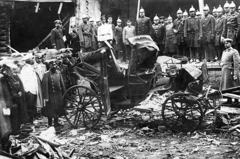 Russland, Attentat auf Stolypin Scherl Bilderdienst 1906. Attentat auf den russischen Ministerpräsidenten Stolypin. UBz: den zertrümmerten Wagen des Attentäters. 6662-06 ADN-ZB-Archiv Zaristisches Rußland: Am 25.August 1906 wurde auf den russischen Ministerpräsidenten P.A.Stolypin ein Bombenattentat verübt. Das Foto zeigt den zerstörten Wagen des Attentäters auf der Apothekerinsel bei Peteersburg. 6662-06 [Bei St. Petersburg.- Zerstörte Kutsche nach Anschlag auf den russischen Ministerpräsidenten Pjotr A. Stolypin am 25.8.1906 auf seinem Landsitz] Abgebildete Personen: Stolypin, Pjotr Arkadjewitsch: Ministerpräsident, Innenminister, ermordet 1911, Rußland (GND 118618636) Information added by Wikimedia users.